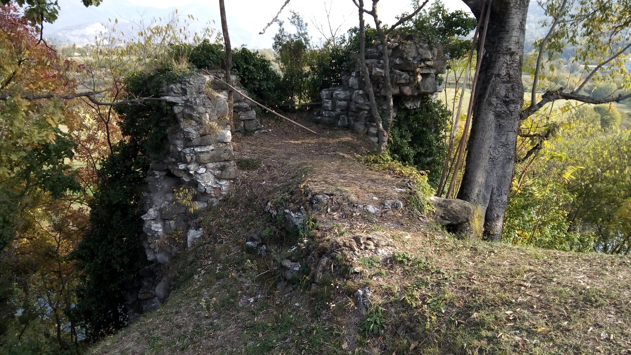 Quello che resta di una delle torri di vedetta del Castello della Mussiga su un'ansa del Fiume Oglio appena visibile in basso a sinistra